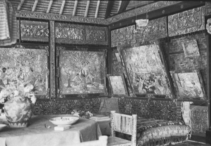 negatief. Interieur van het huis van de Belgische schilder Le Mayeur de Merprès